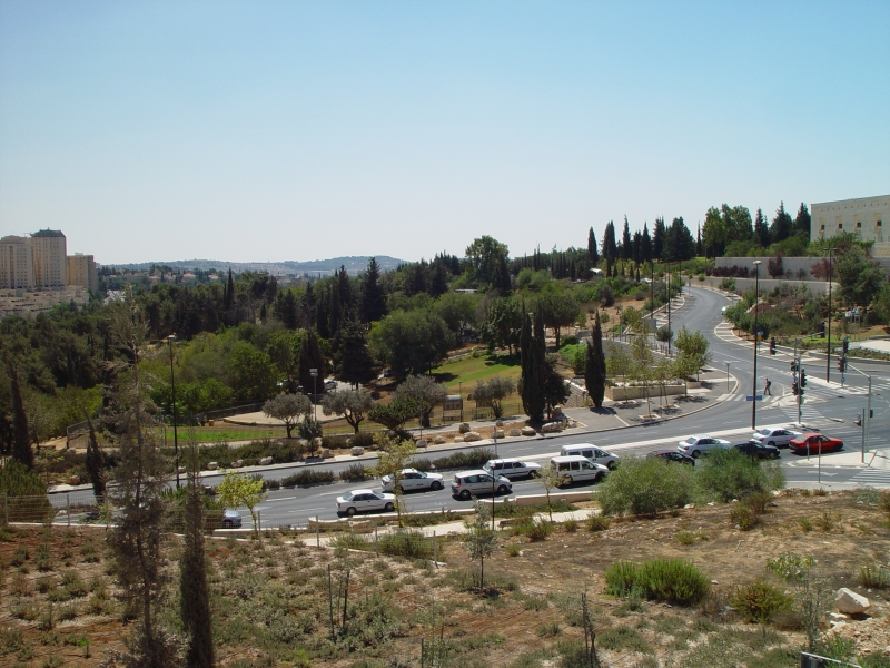 מבט על אזור שייח באדר